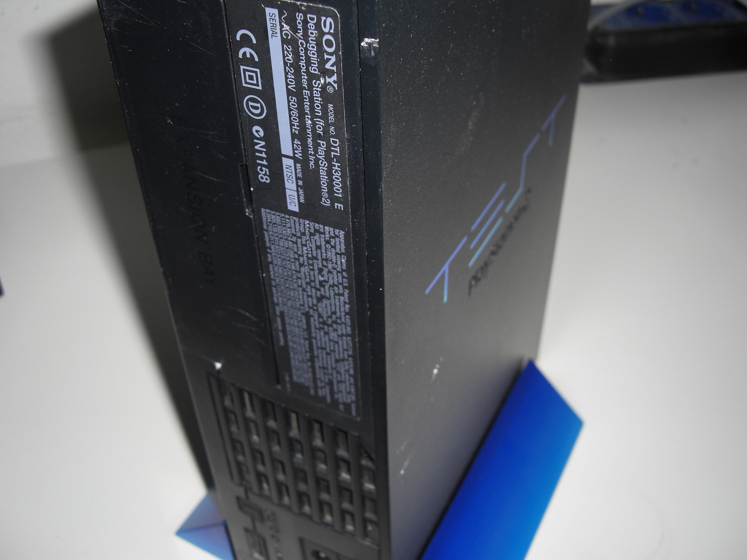 PS2 Debugging Station ("TEST") DTL-H30001 E